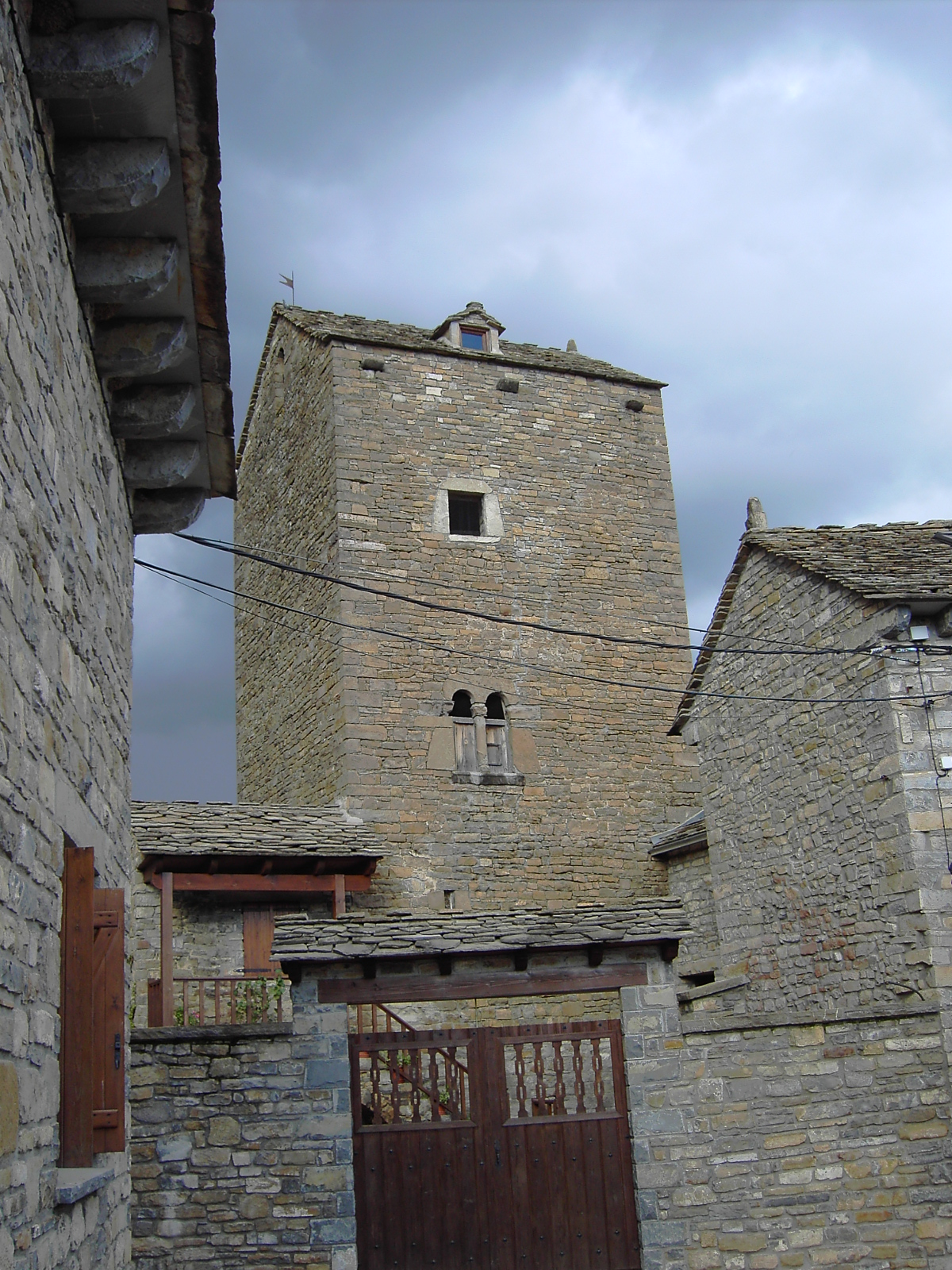 Torre defensiva de Casa Buil en San Vicente de Labuerda, de los siglos XVI-XVII.